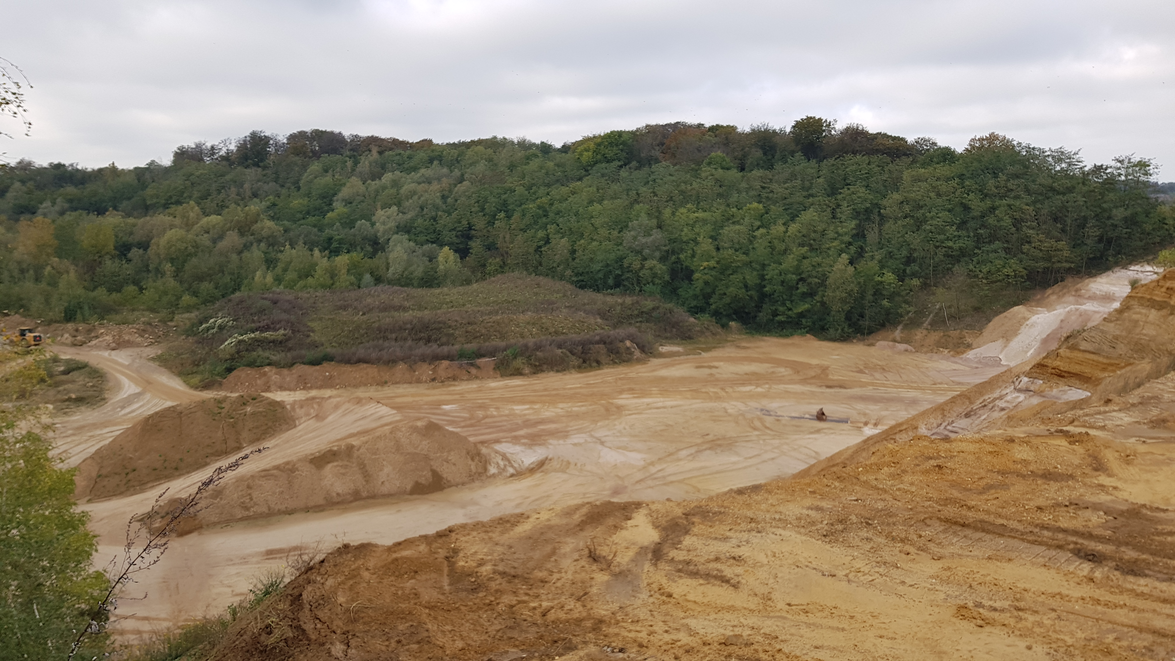 Groeve Spaubeek, Spaubeek, Nederland